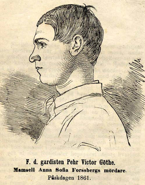 F. d. gardisten Pehr Victor Göthe. Mamsell Anna Sofia Forssbergs mördare. Påskdagen 1861.